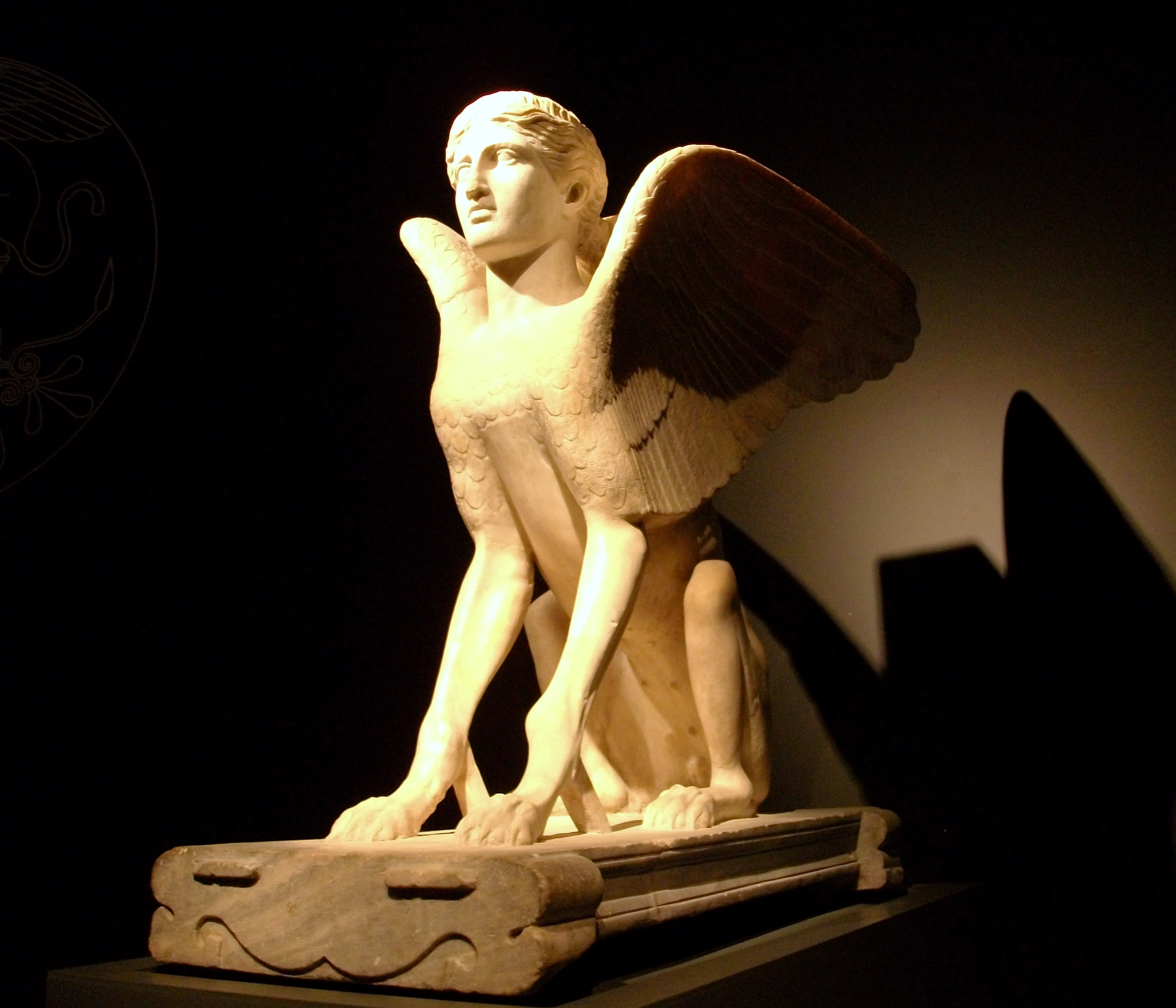 Esfinx de marbre, probablement era la base d'una taula, amb cap de dona, cos de lleó i ales d'àguila. Les estàtues d'esfinxs solien ser fites funeràries en el seu paper de guardianes de les tombes. Època romana, circa 120-140 dC., procedent de Monte Cagnolo, als afores de Lanuvium, prop de Roma, Itàlia. Dimensions: 840 mm x 800 mm x 550 mm. GR 1805,0703.40 (escultura 1719). Pertany a l'exposició La bellesa del cos, al Museu Arqueològic d'Alacant. Forma part de l'exposició permanent del Museu Britànic.